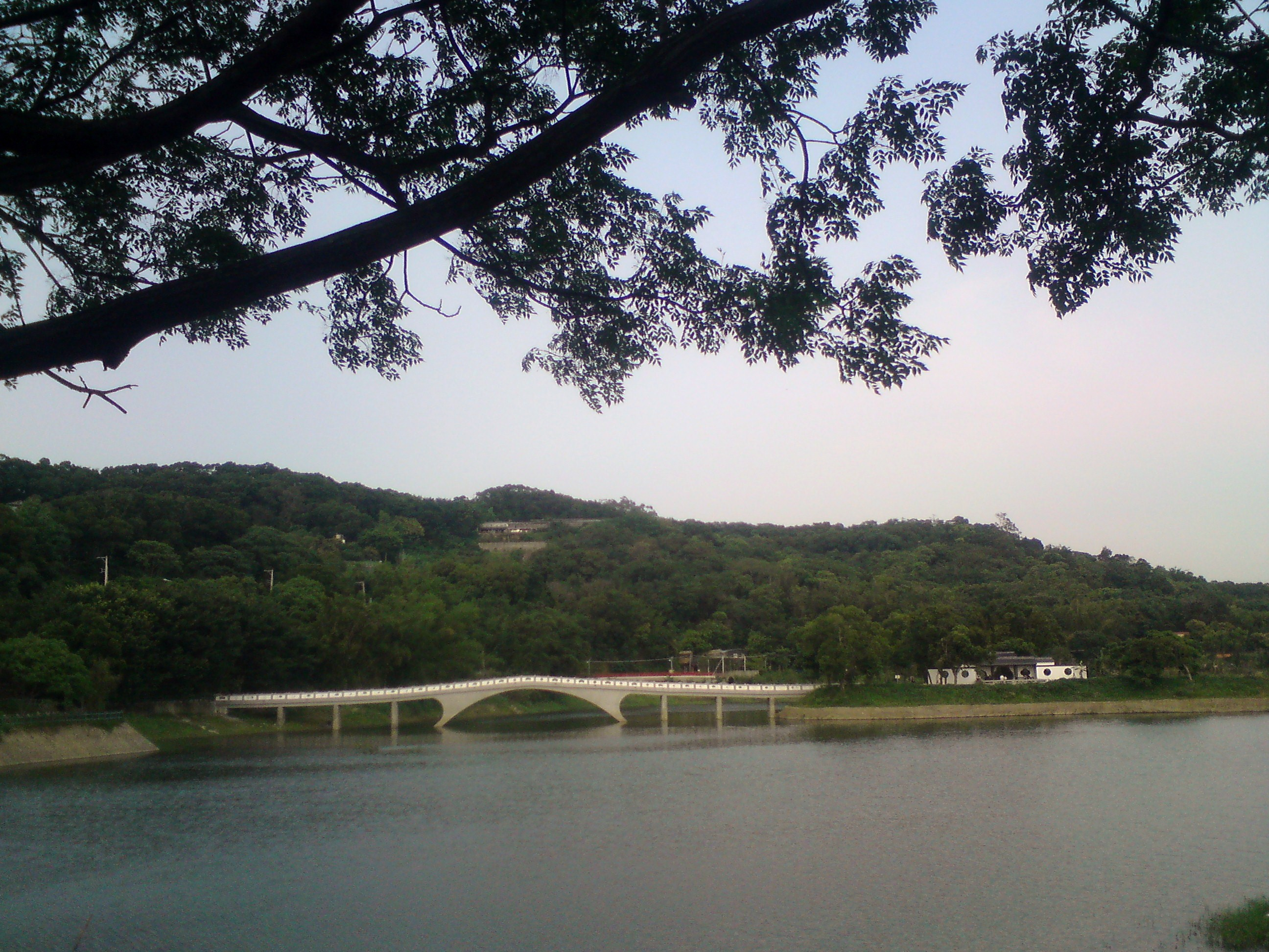 中文（台灣）: 新竹青草湖風景